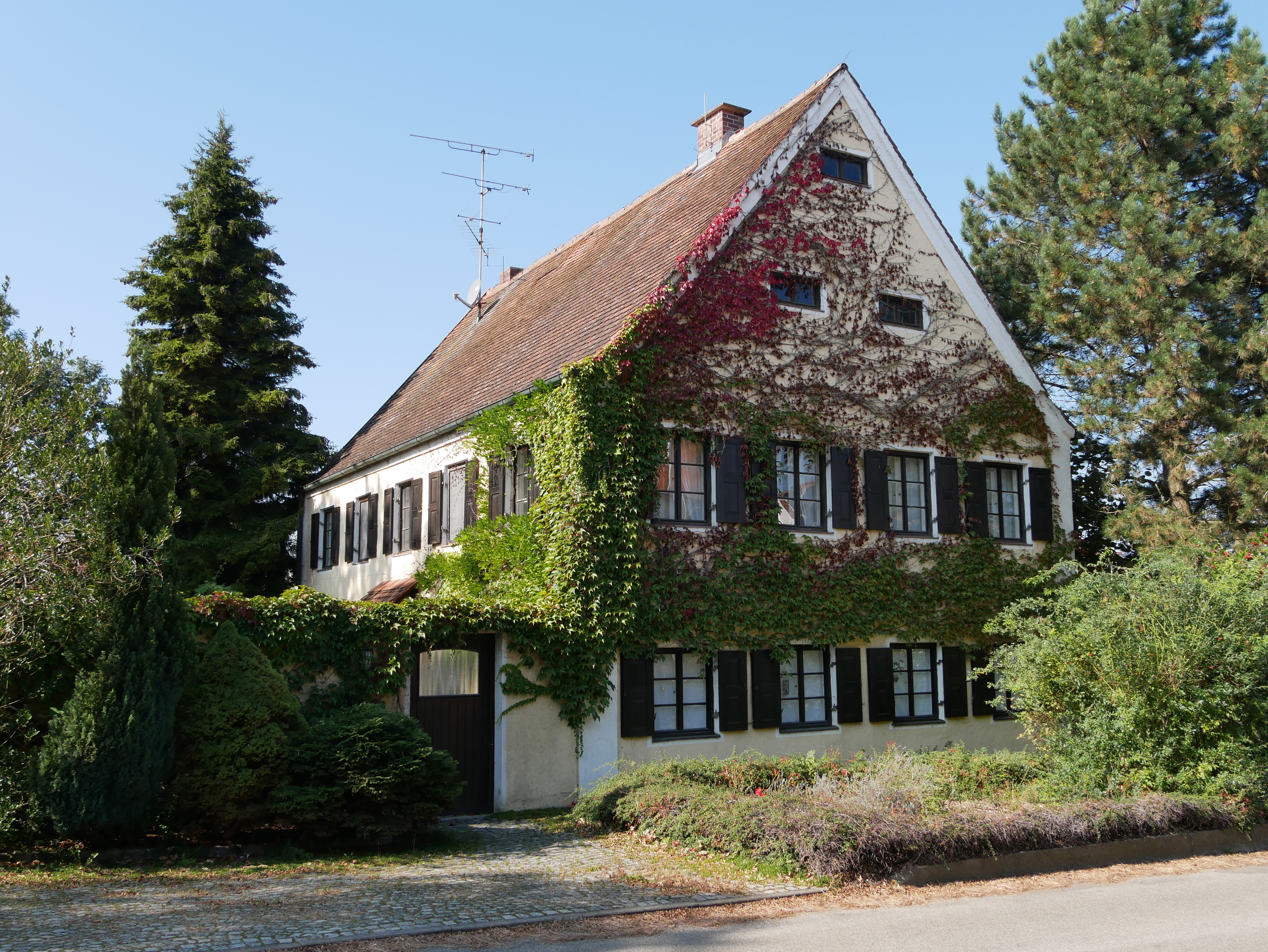 Moorenweis, Ortsteil Steinbach, Steinbach 37: Pfarrhaus des ehemaligen Pfarrhofs